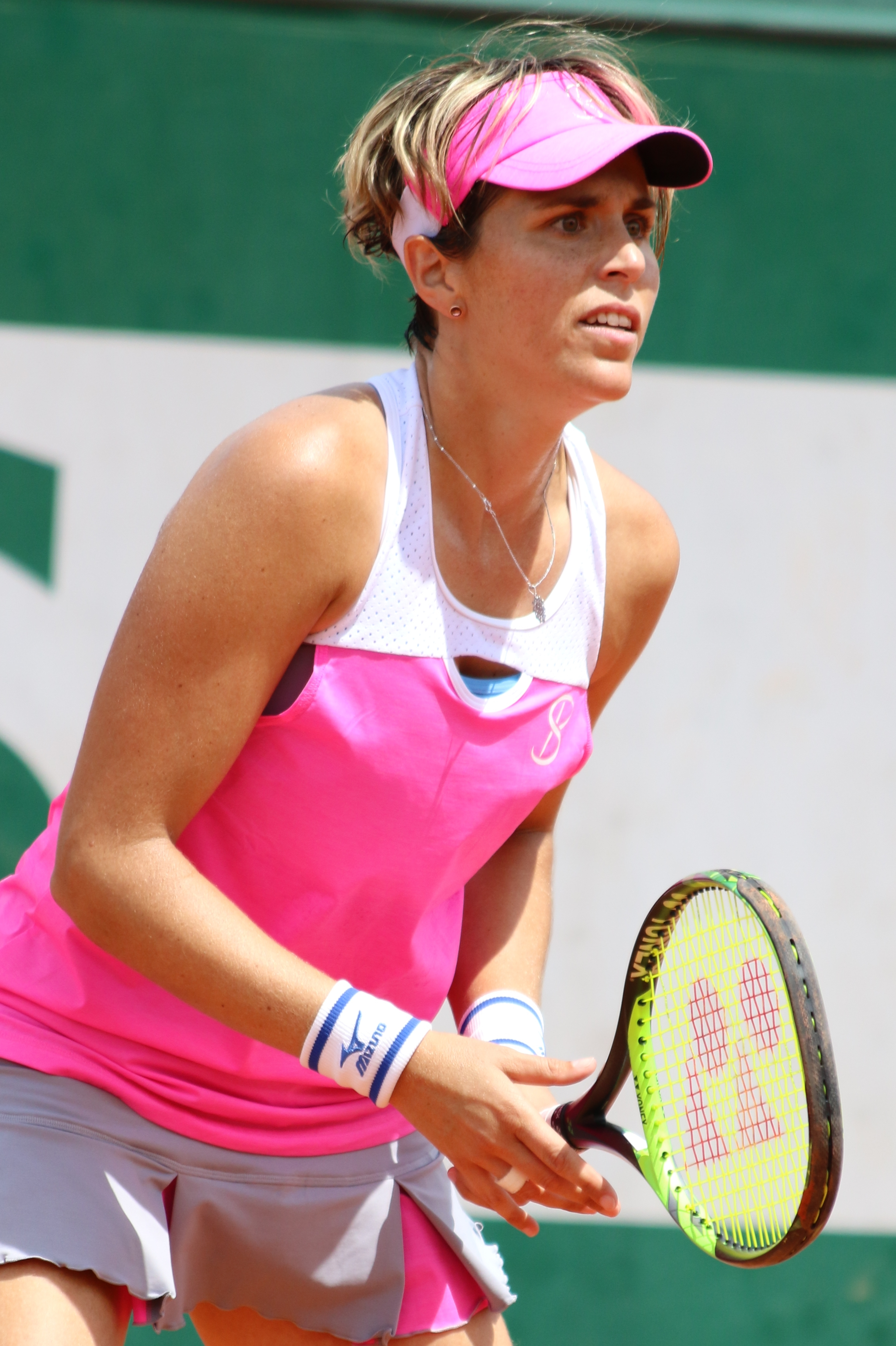 Martinez Sanchez RG18 (9)